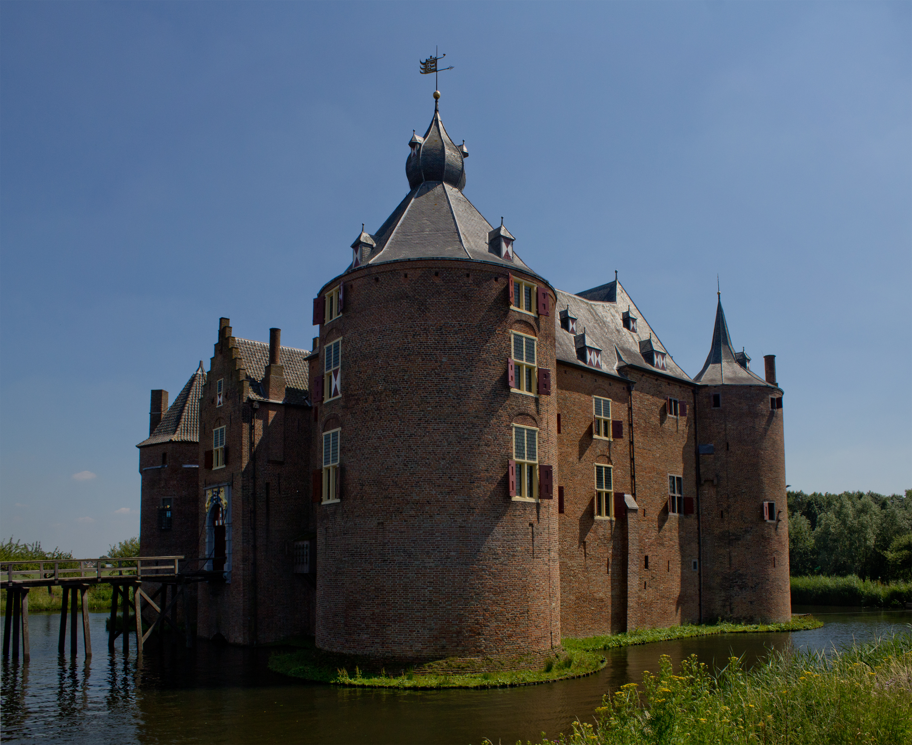 Kasteel Ammersoyen - Hoofdburcht